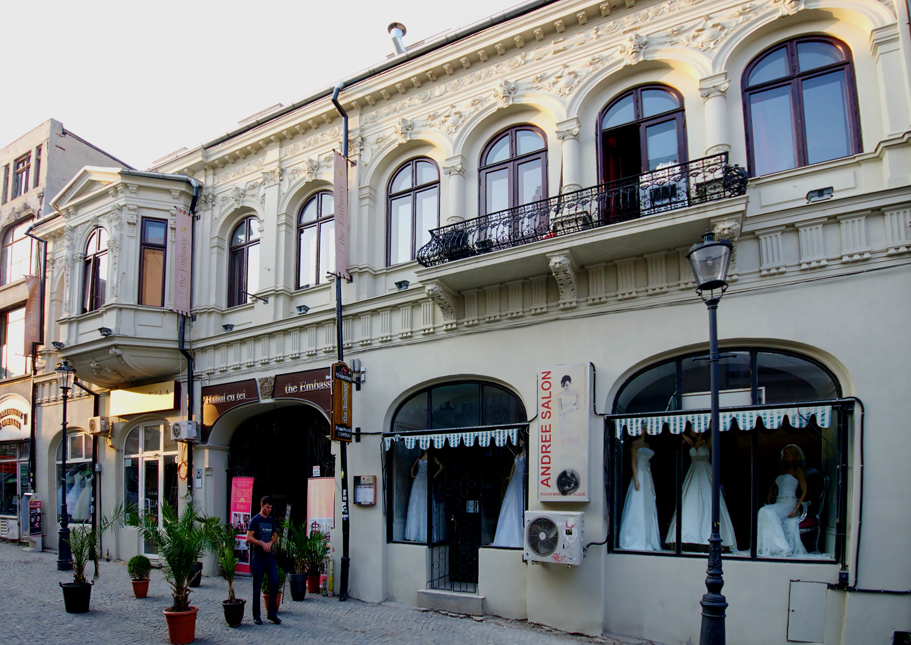 Ansamblul de arhitectură "Str. Hanul cu Tei" - ieșirea Lipscani, Lipscani 63-62, Blănari 5